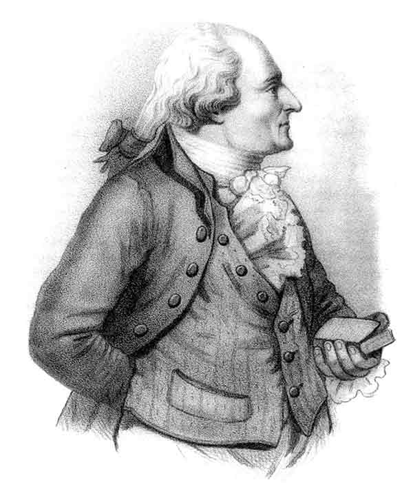 Carl Israel Hallman (1732-1800)